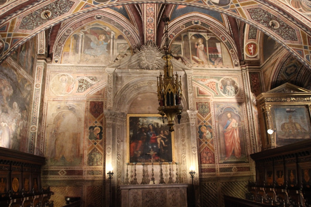 Siena_Palazzo Pubblico